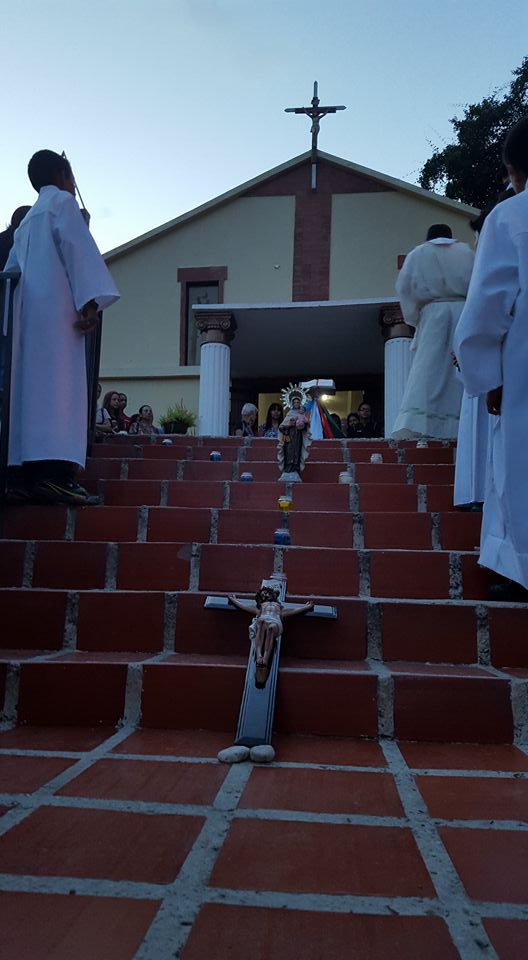 Iglesia Parroquia Nuestra Señora de la Luz Coche Caracas Venezuela, desde el exterior